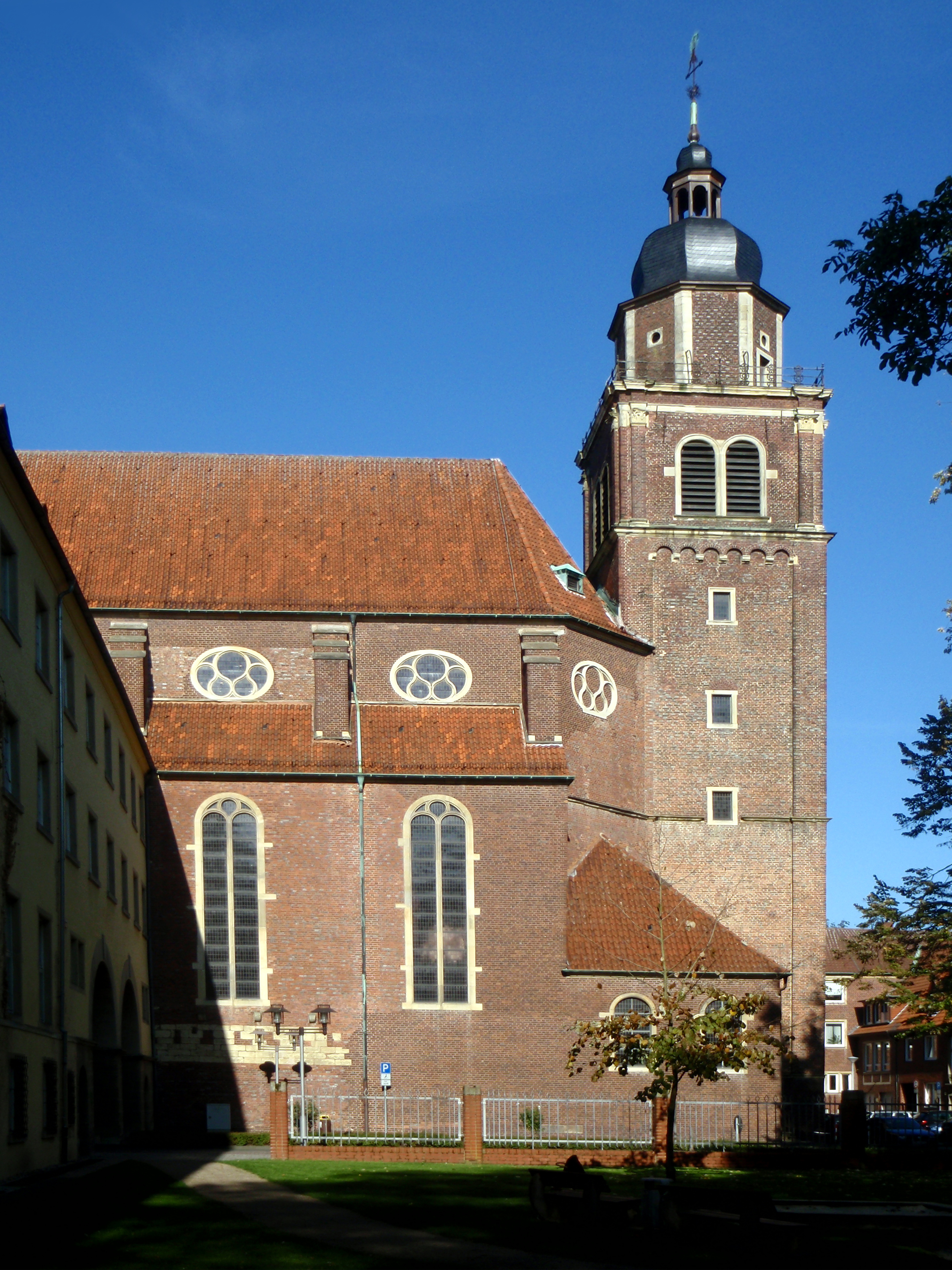 Die ehemalige Jesuitenkirche (heute evangelische Kirche) in Coesfeld.